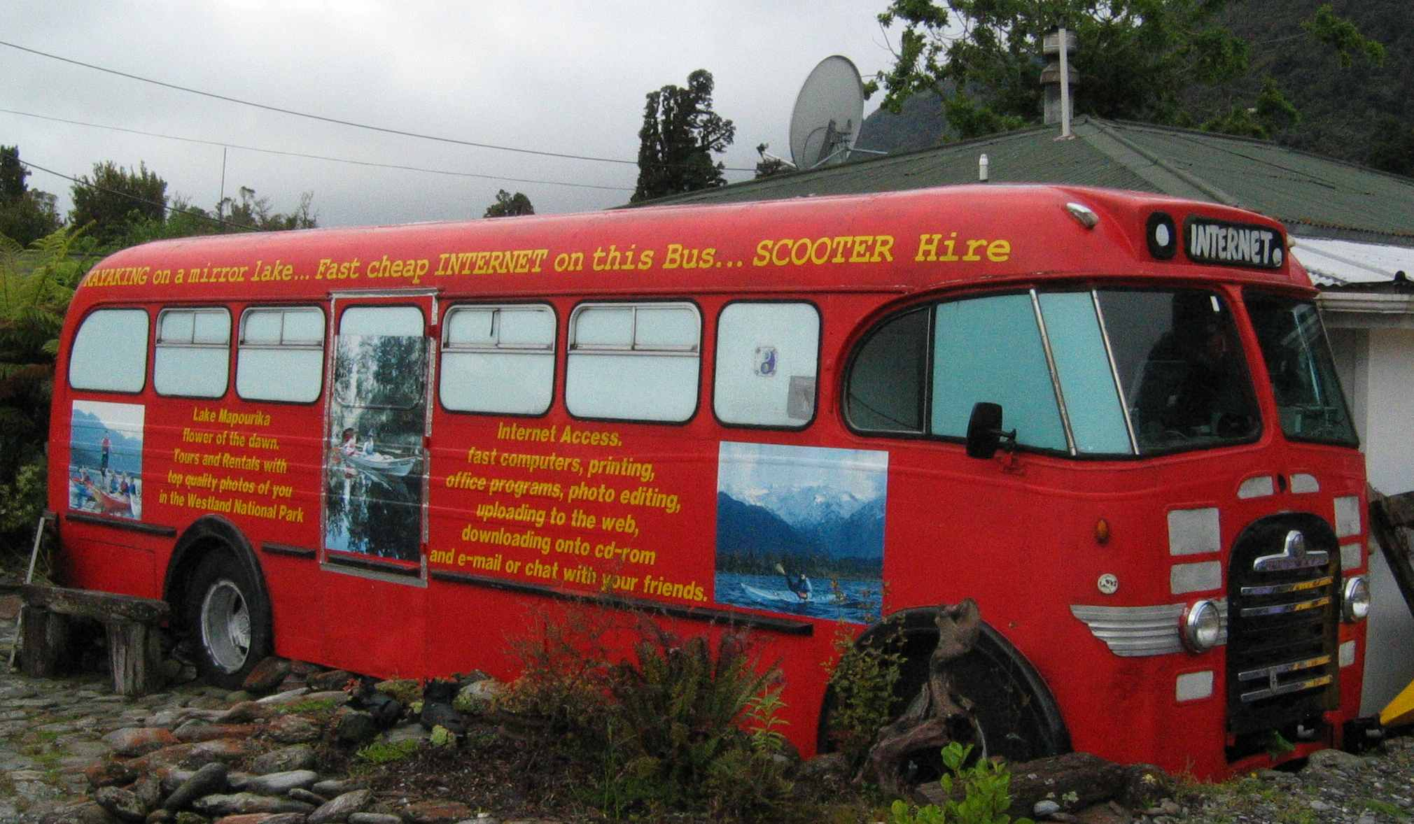 Internetcafe beim Franz-Josef-Gletscher